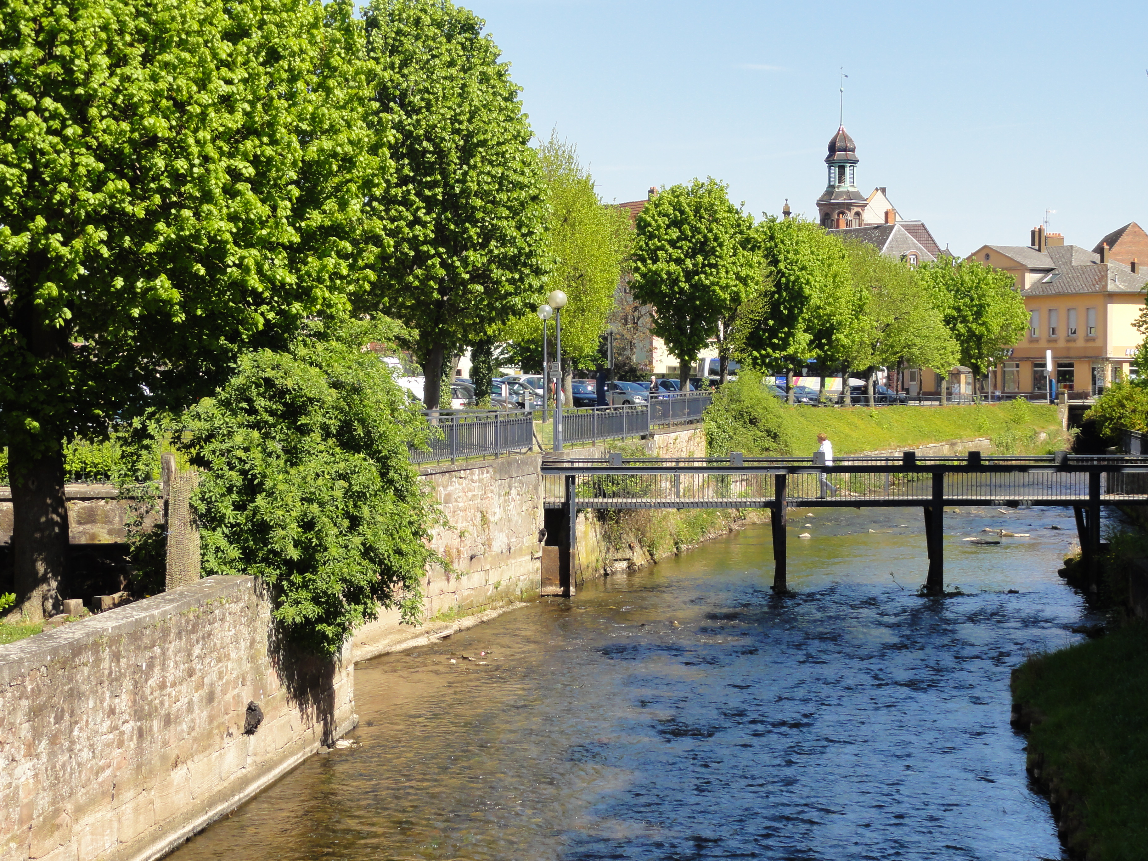 Alsace, Bas-Rhin, Saverne, 1 quai Zorn, La Zorn.